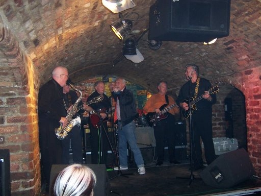 Actuación de los Undertakers en el Cevern Club en Julio de 2006